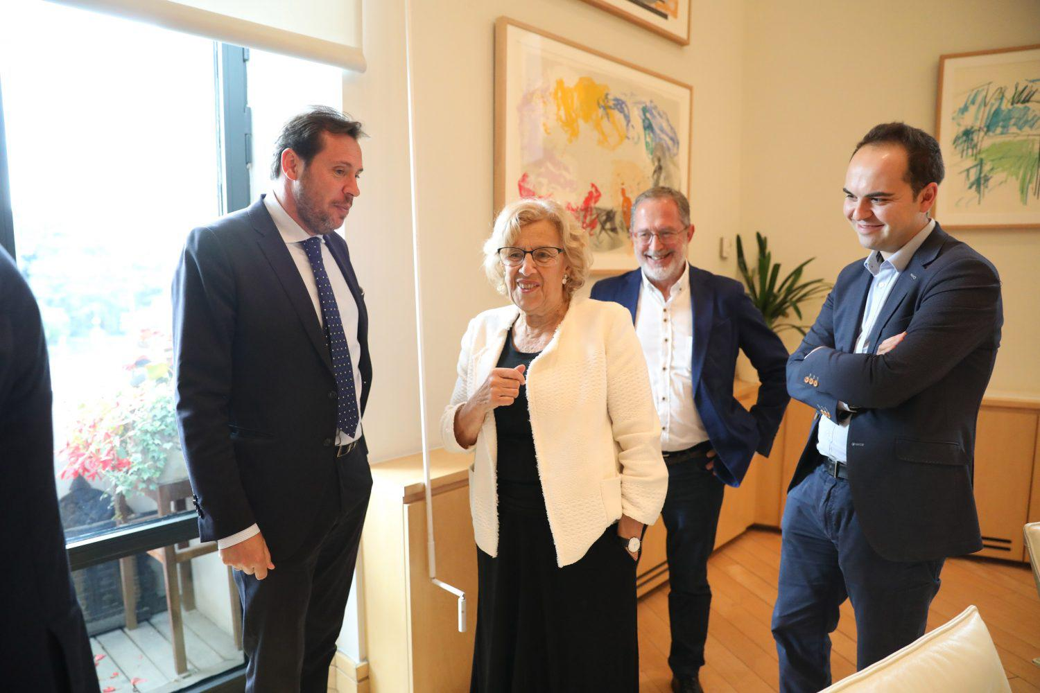 El Ayuntamiento de Madrid se encamina hacia una gestión urbanística más abierta, transparente, eficaz y sostenible. Para ello, ha desarrollado una potente aplicación que quiere compartir con el resto de los municipios. El primero de ellos ha sido Valladolid, con cuyo alcalde, Óscar Puente, ha firmado la alcaldesa de Madrid, Manuela Carmena, un convenio de colaboración para compartir la nueva herramienta. La firma ha tenido lugar en el palacio de Cibeles, durante la mañana de hoy, lunes.